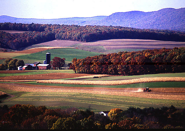 宾夕法尼亚农村风光 from en wiki Image Number K5052-5 Farming near Klingerstown, Pennsylvania. Photo by Scott Bauer.